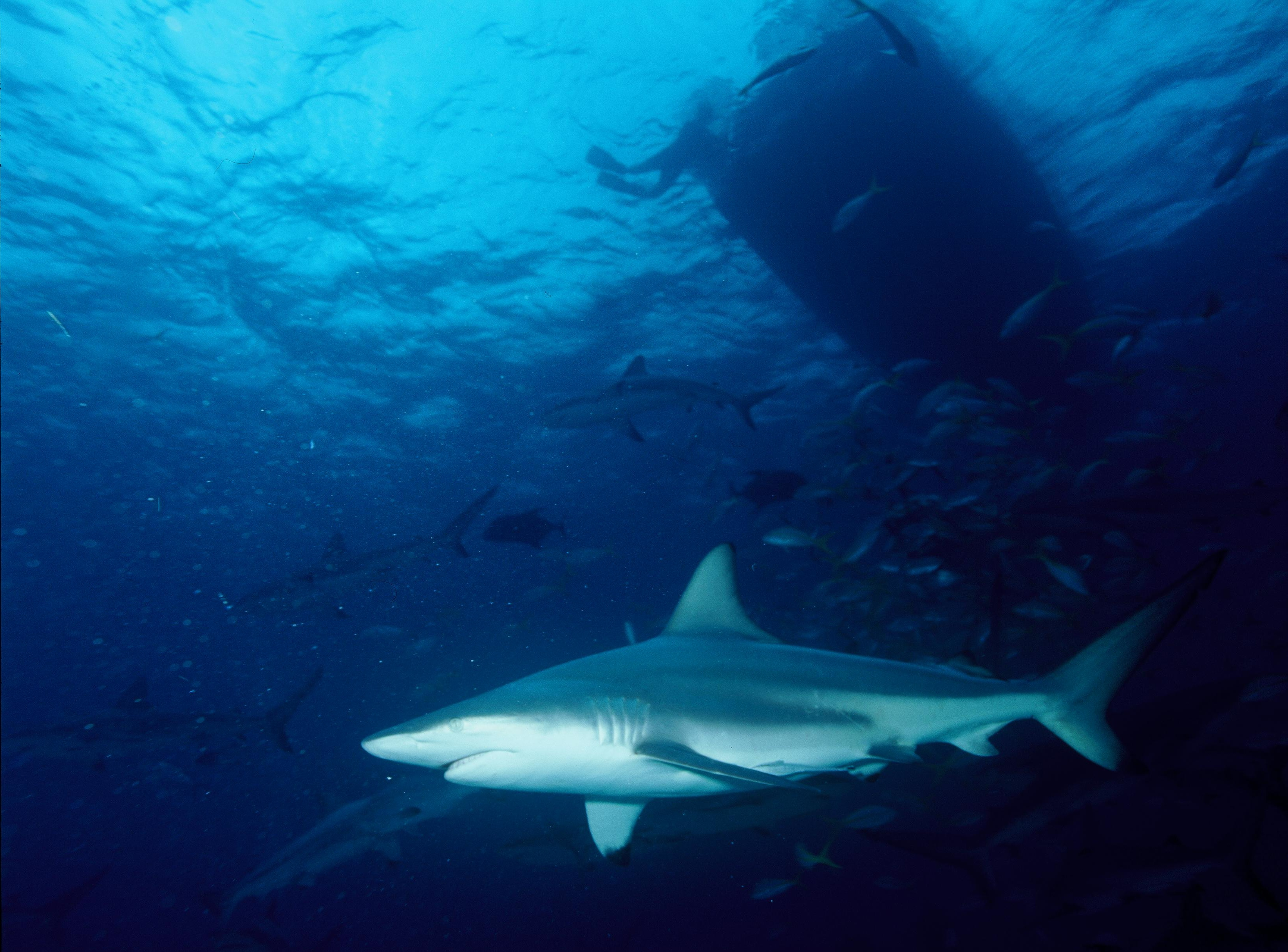 C.limbatus2